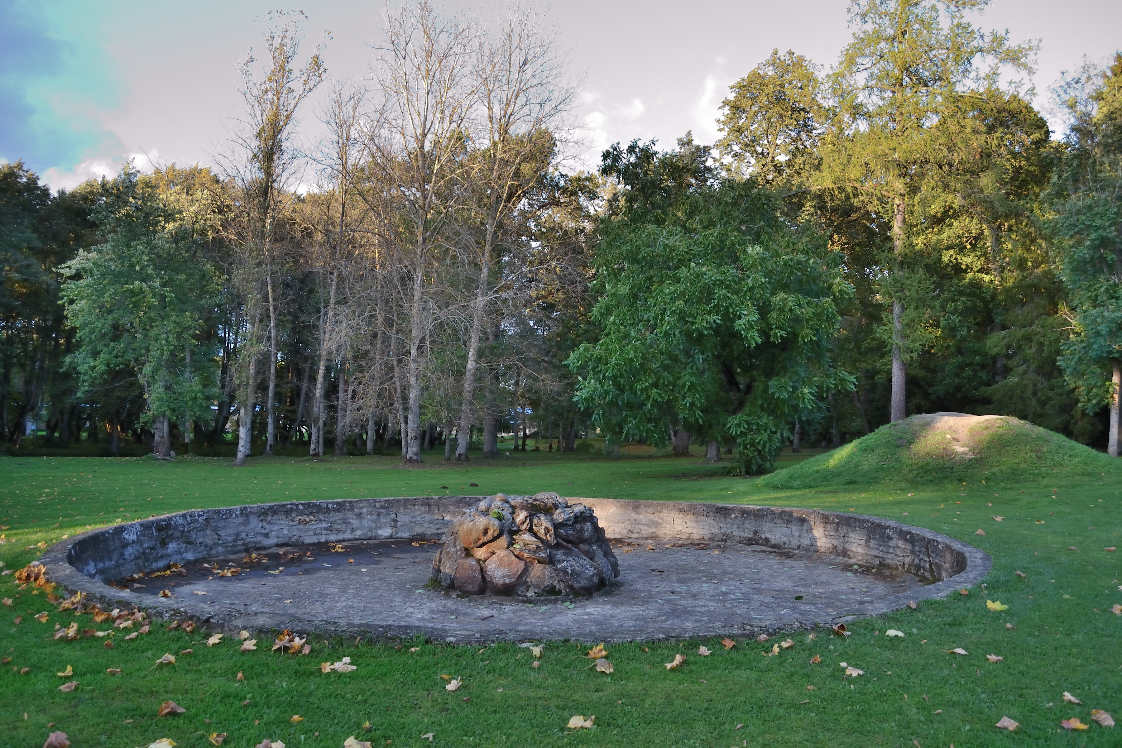 Vääna mõisa park, 18.-19.saj